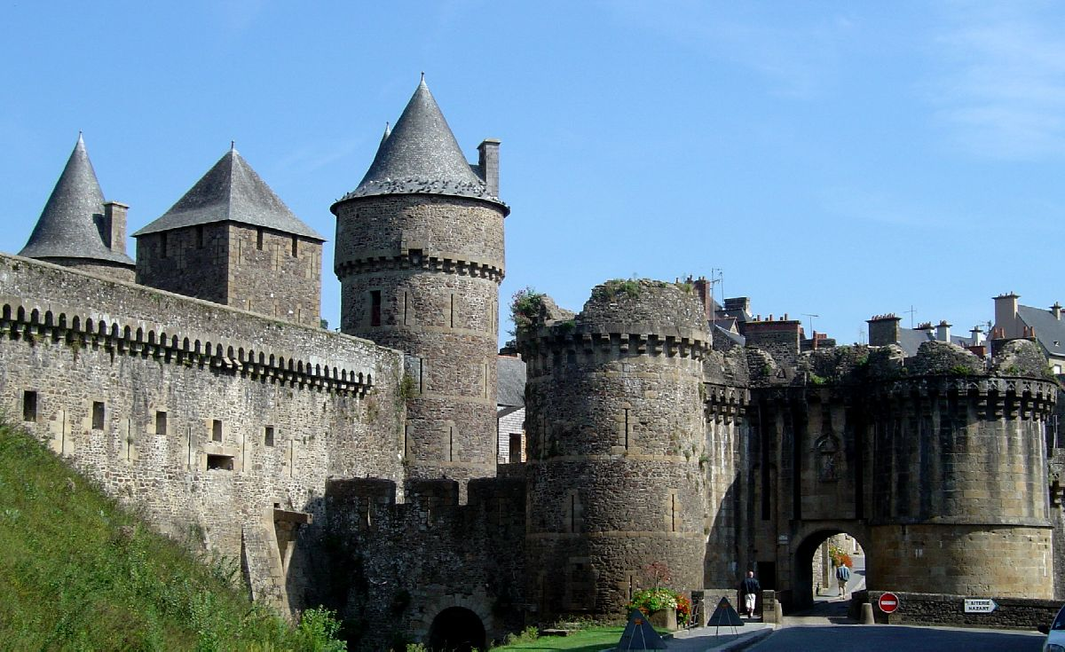 Fougères, porte Notre-Dame - photo personnelle prise en août 2004, publiée en GFDL pour wikipedia utilisateur:Luna04